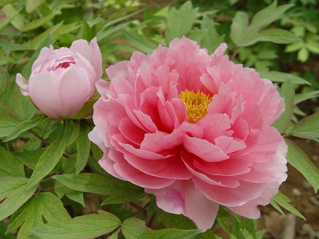 这是一个关于洛阳牡丹的图片